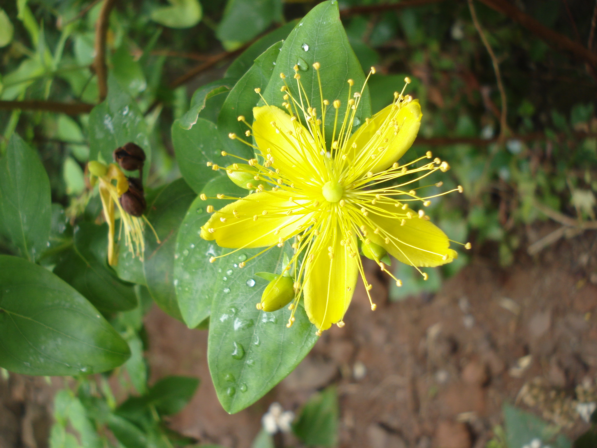 Foto tomada en Anaga, Tenerife